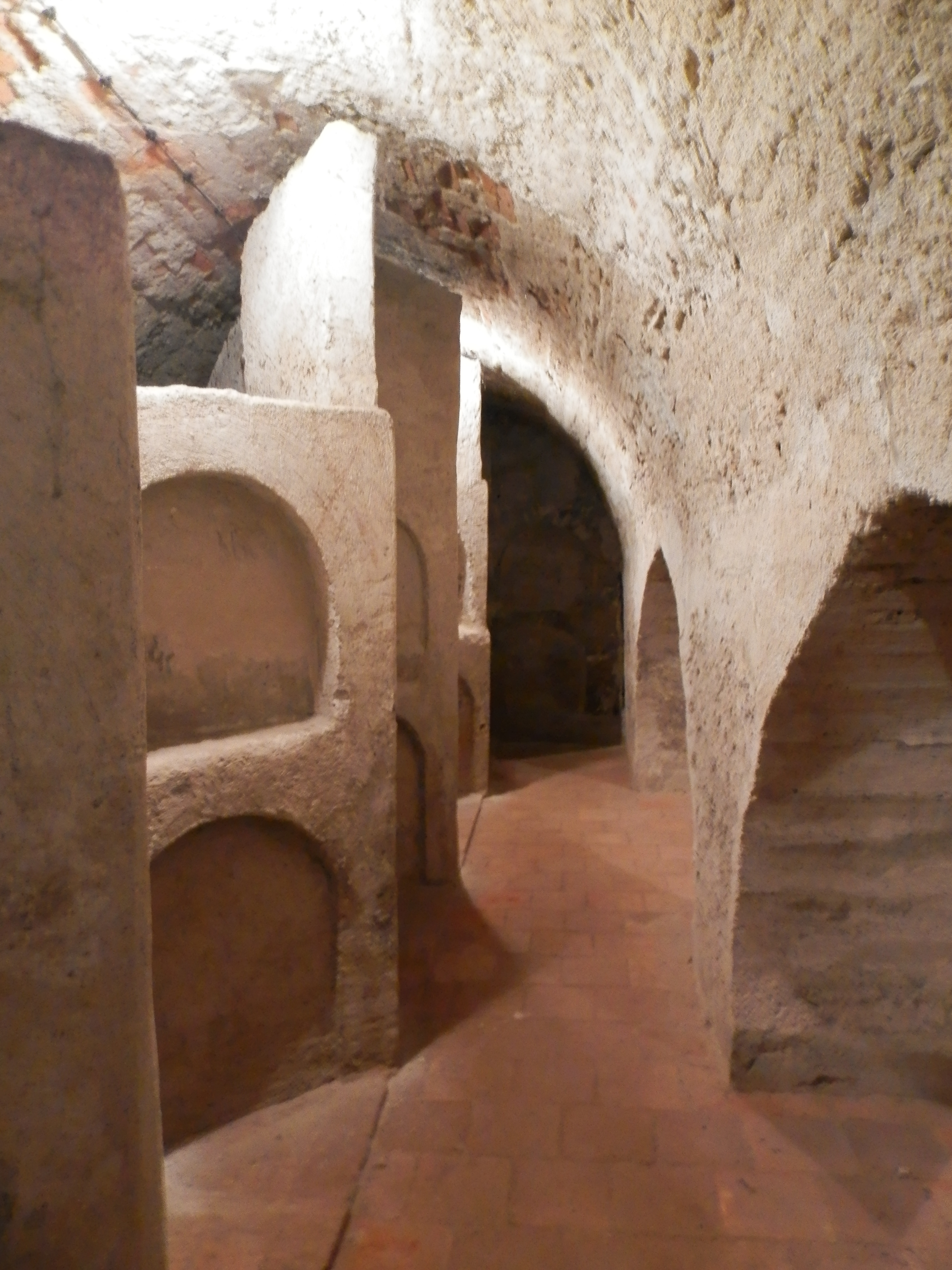 Vnútro kostnice pod Kostolom sv. Michala v Košiciach.